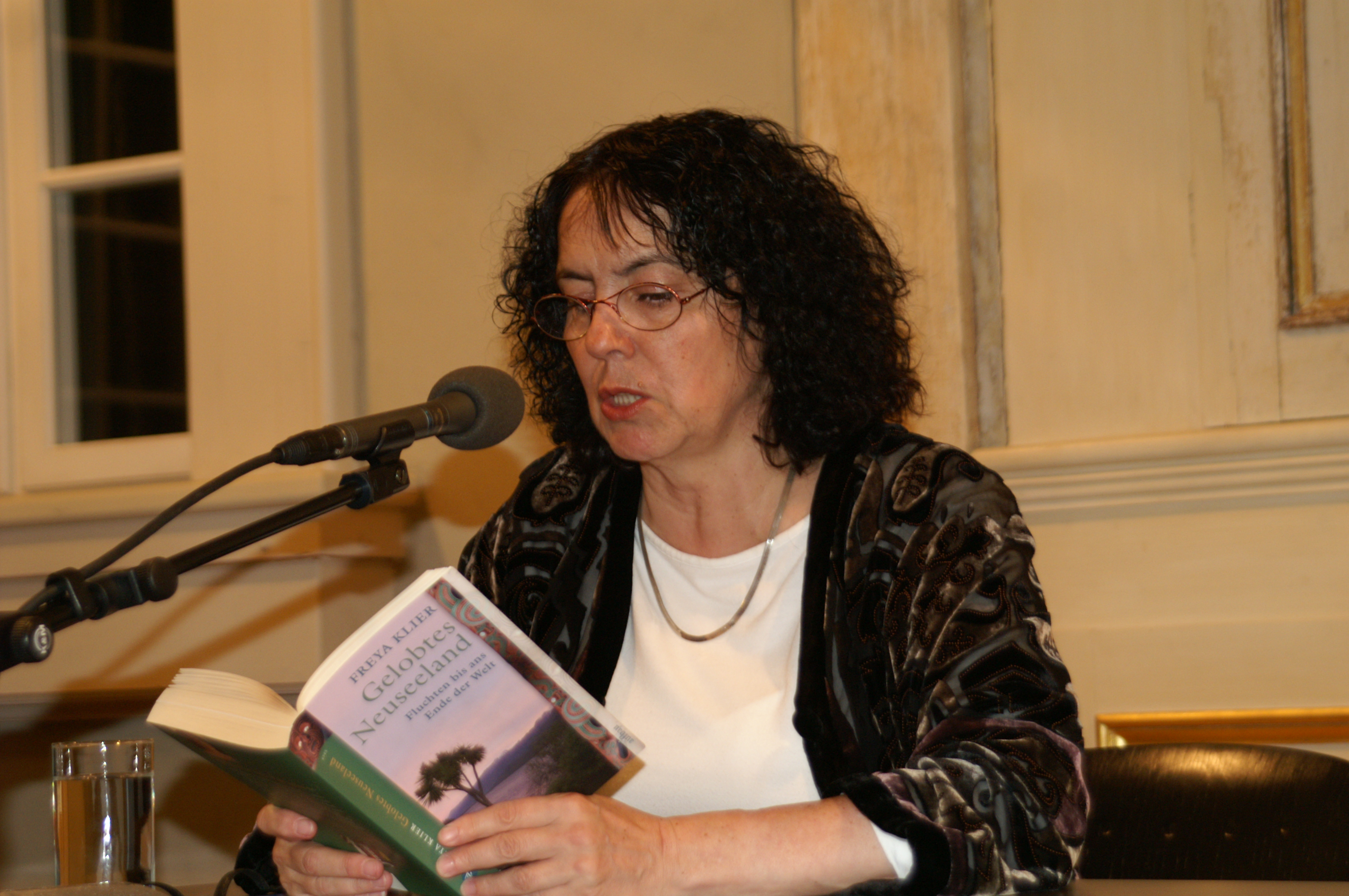 Freya Klier liest in der Kleinen Synagoge in Erfurt aus ihrem Buch "Gelobtes Neuseeland"